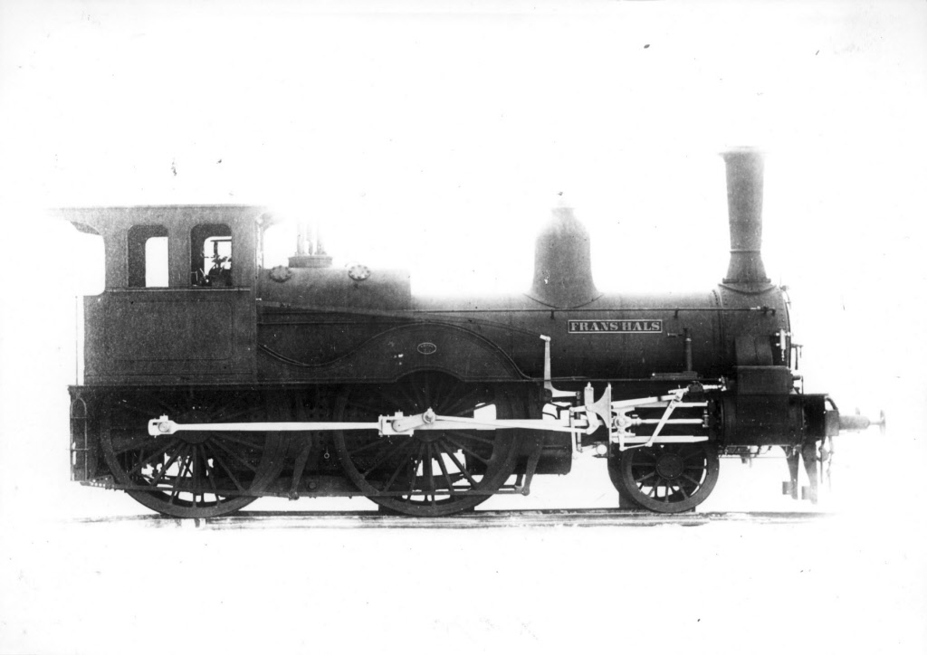 Afbeelding van de stoomlocomotief nr. 184 van de H.S.M. (Hollandsche IJzeren Spoorwegmaatschappij). met de naam "Frans Hals" (uit de serie 126-135, 144-148, 154-159 en 184-189) van de H.S.M. en later omgenummerd als nr. 1122 (serie 1100) van de N.S.